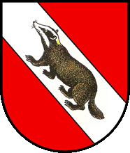 Wappen von Chabrey Kanton Waadt Schweiz